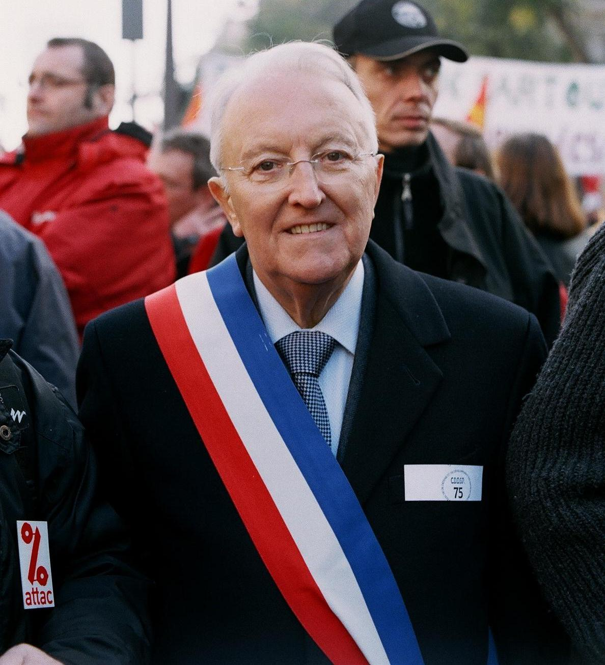 Georges Sarre à une manifestation contre la privatisation